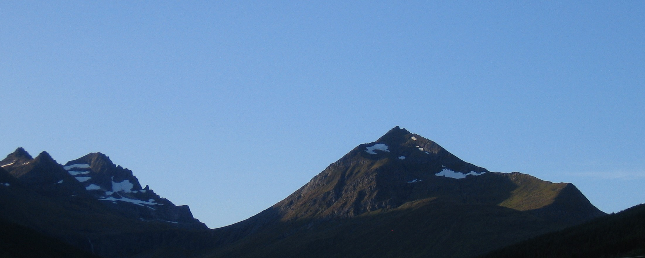 Middagshornet sett frå nord